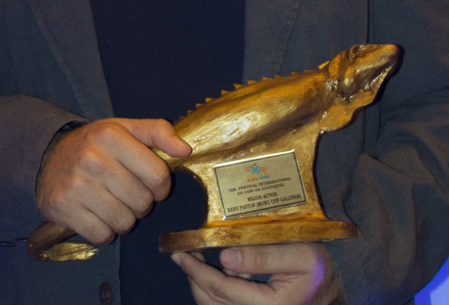 El Premio Iguana Dorada es una estatuilla creada y diseñada por el artista Felipe Crespo para la primera edición del Festival Internacional de Cine de Guayaquil en 2015. En la imagen se puede apreciar el premio en la categoría de Mejor Actor otorgada a René Pastor por su interpretación en la película ecuatoriana Monos con gallinas.